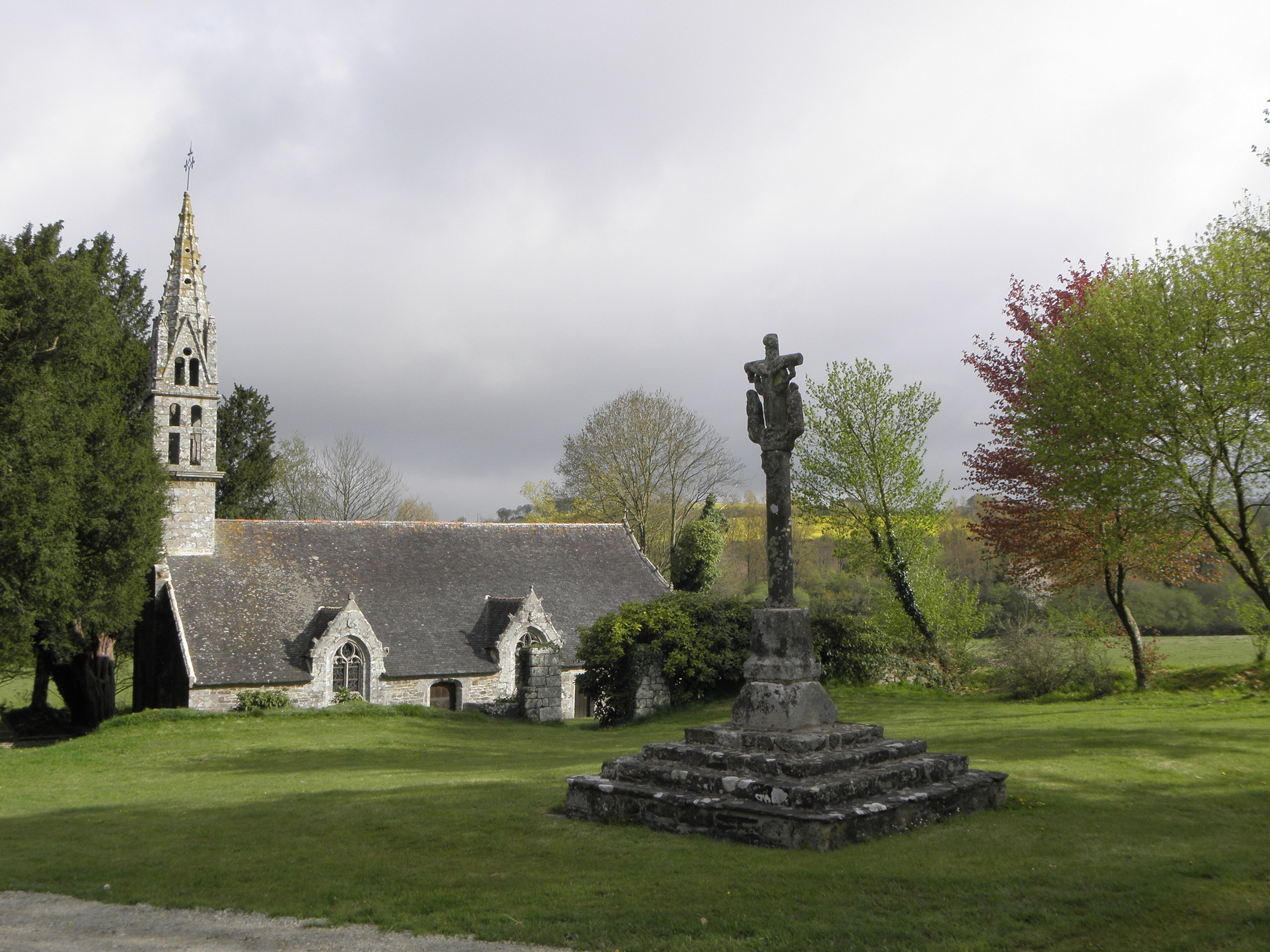 Calvaire et chapelle Notre-Dame-du-Folgoat à Lansalaün, commune de Paule (22). Vue méridionale.